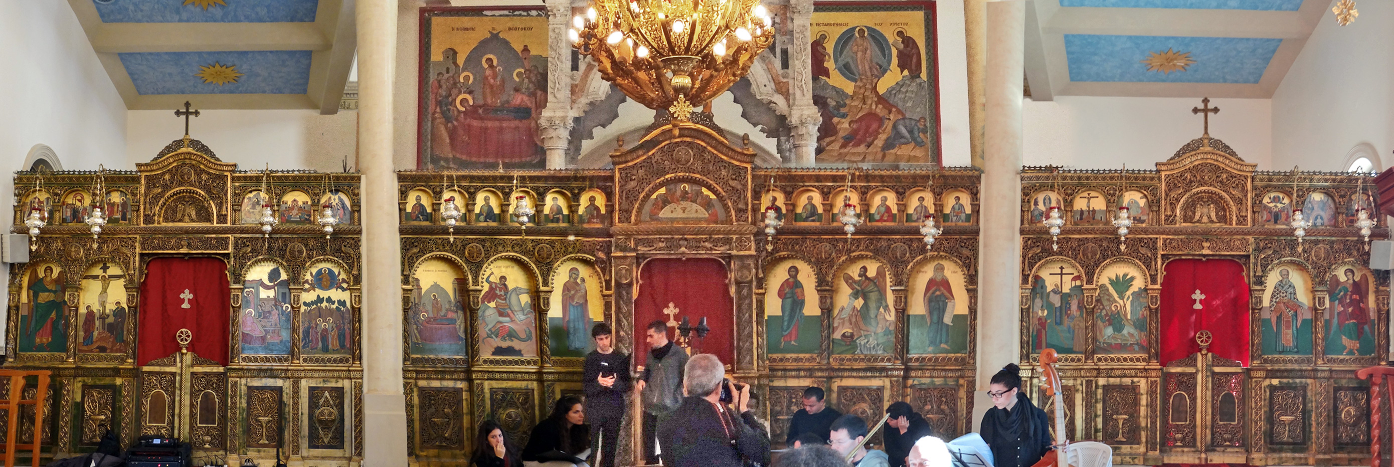 St. Elias Cathedral of the Melkite Catholic Haifa Israel קתדרלת אליהו הנביא של הכנסייה המלכיתית היוונית-קתולית בחיפה